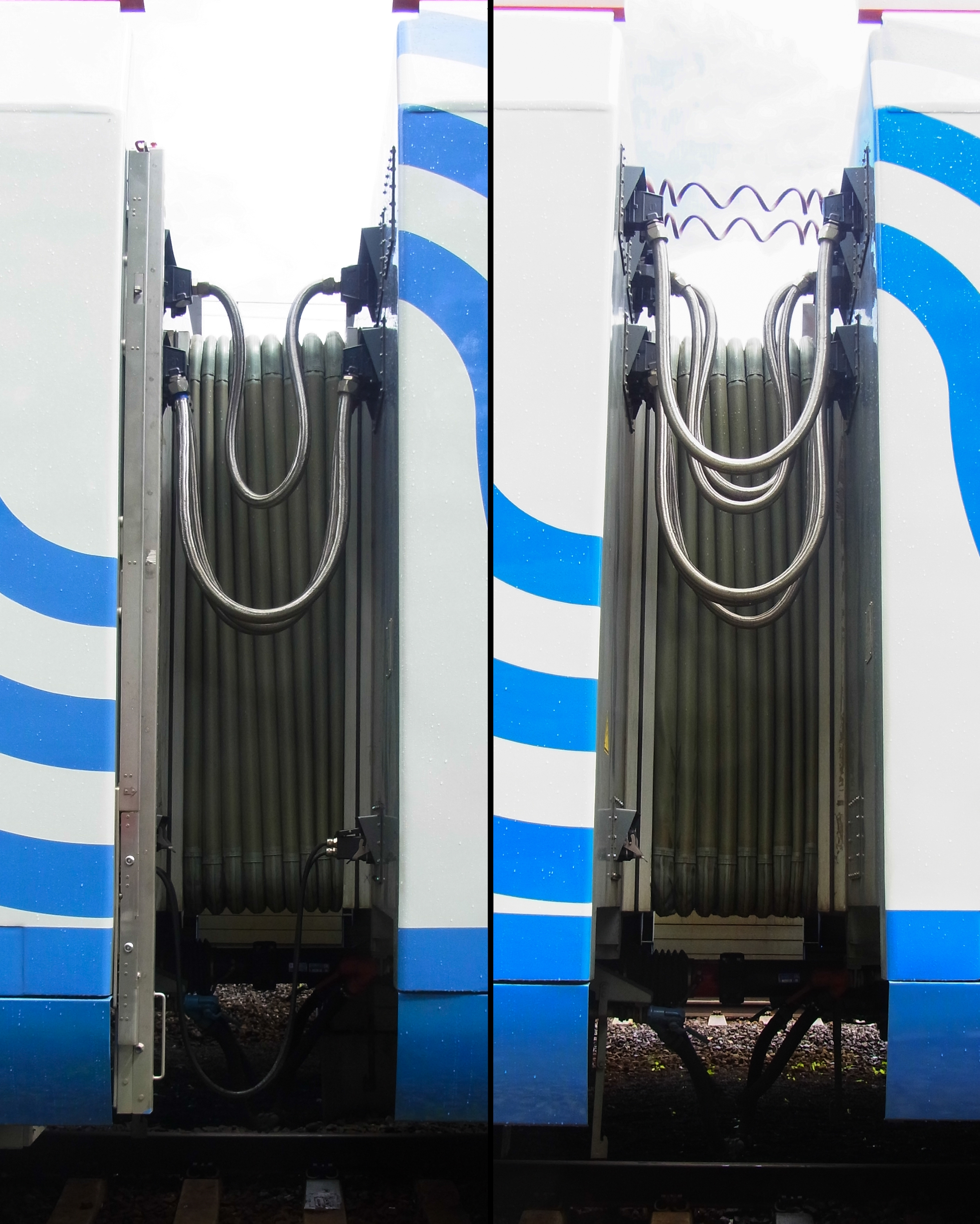 Межвагонное пространство электропоезда ЭГ2Тв. Слева - между головным и промежуточным, справа - между промежуточными вагонами